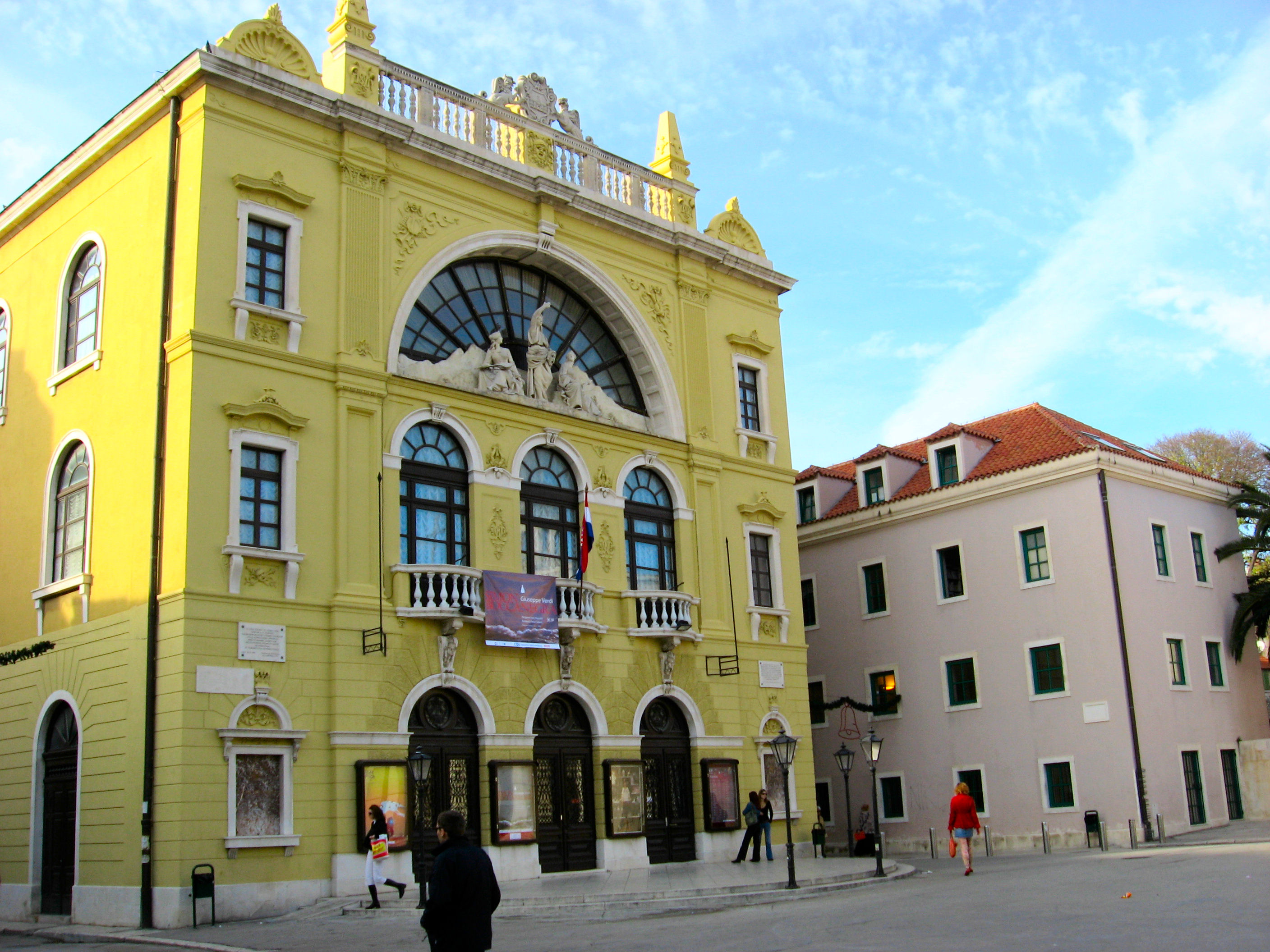 Hrvatsko narodno kazalište u Splitu (Croatian national theater in Split)